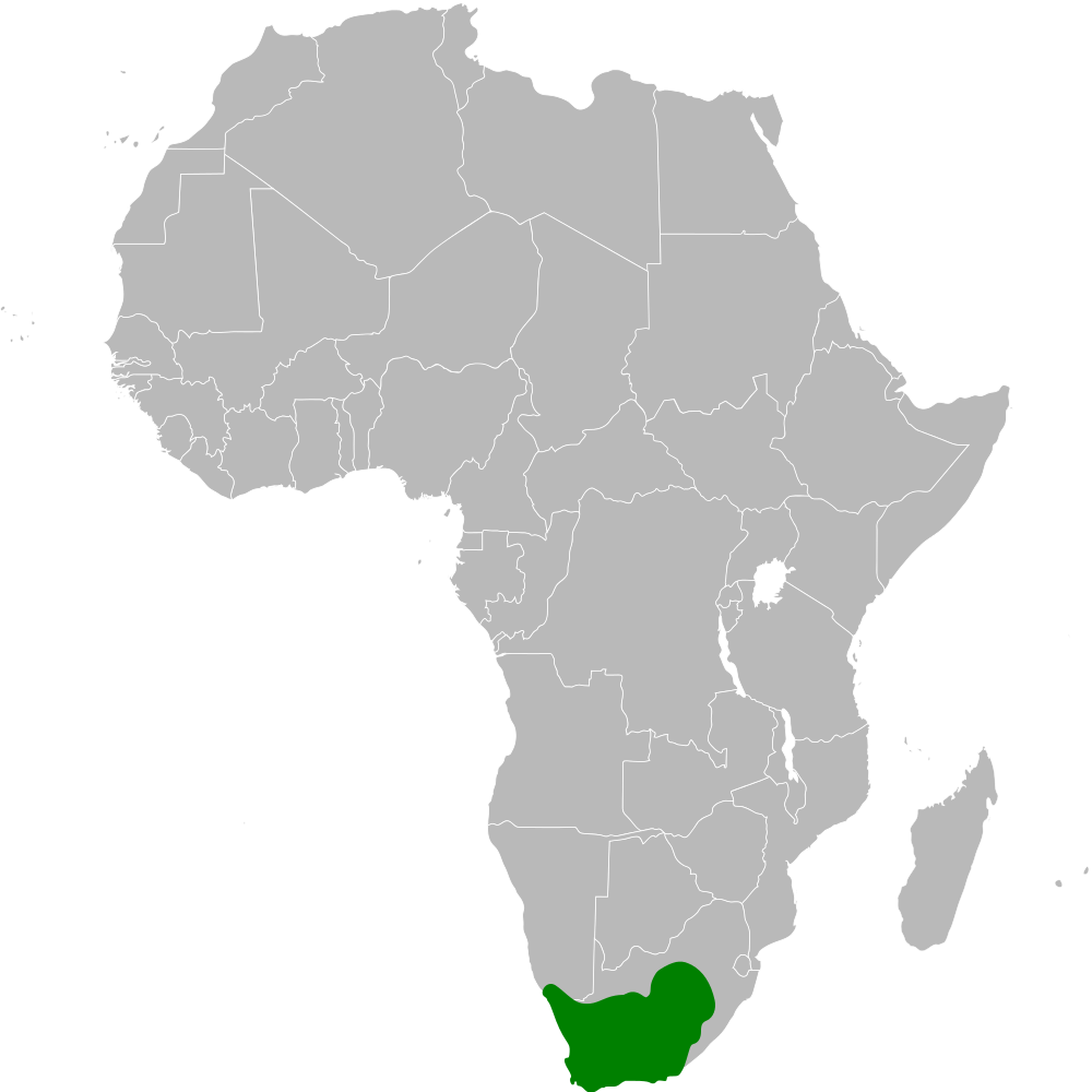 Galerida magnirostris distribution map, based on